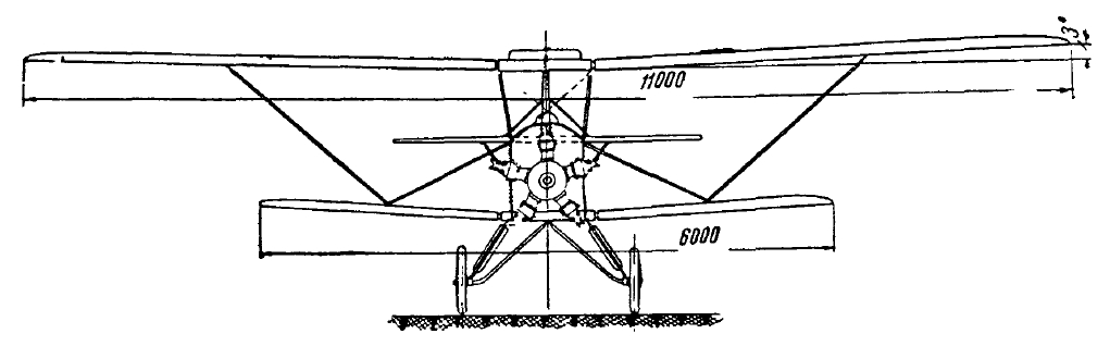 Vinogradov Idrago 3